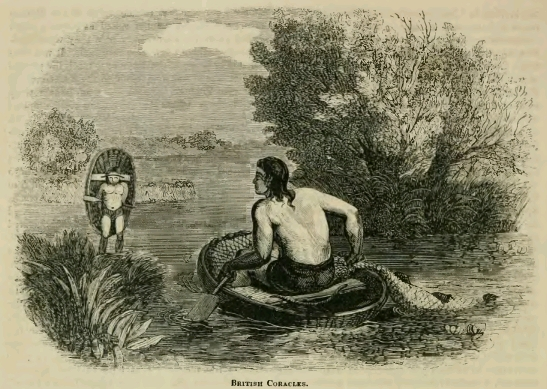 Картинка демонстрирующая кораклы из книги Георга Крейка и Чарльза МакФарлана "The pictorial history of England; being a history of the people as well as a history of the kingdom, vol.I" изданной в Нью-Йорке издательством Harper&Brothers в 1846 году.